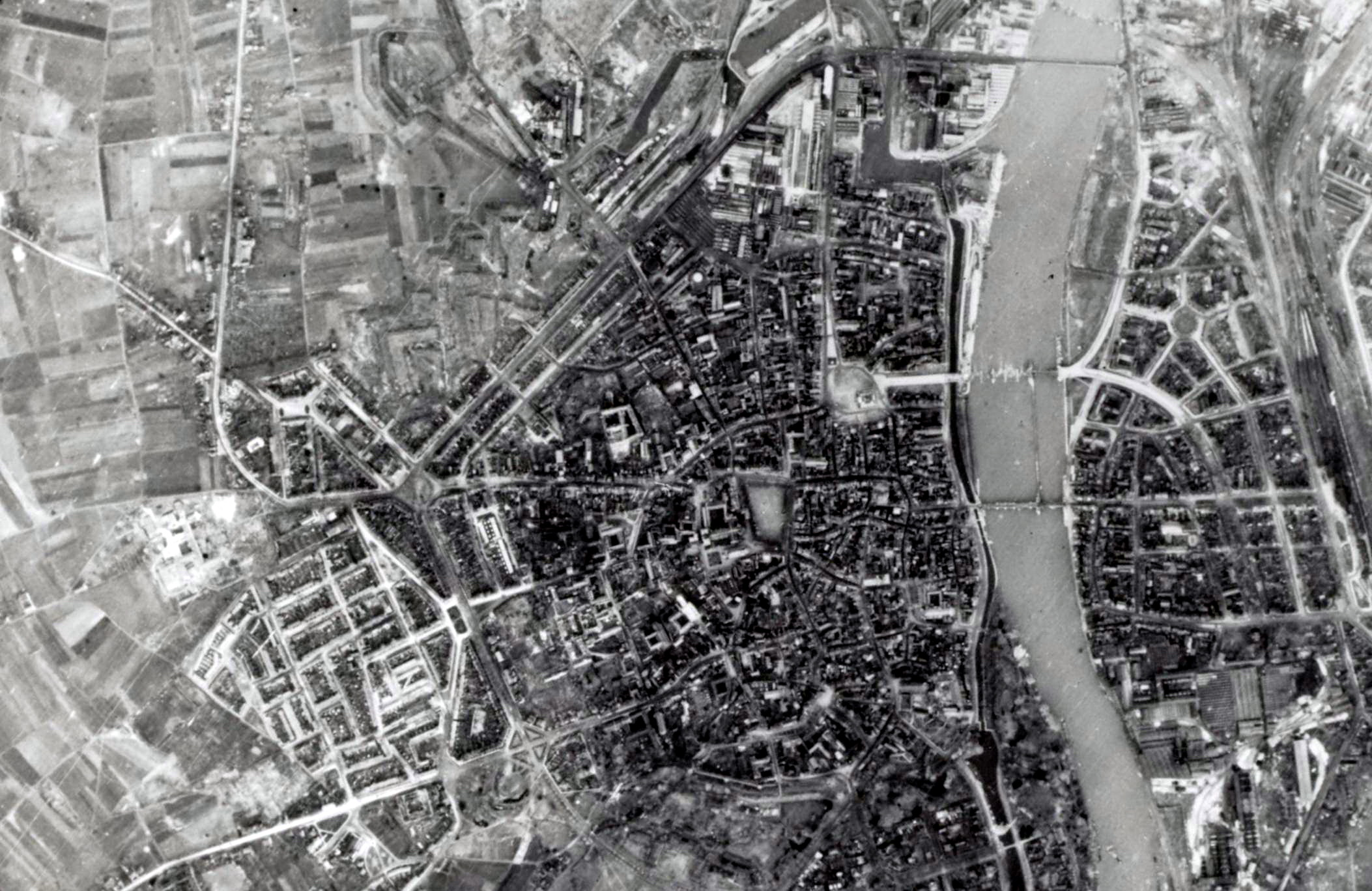 Luchtopname. Maastricht na de bevrijding